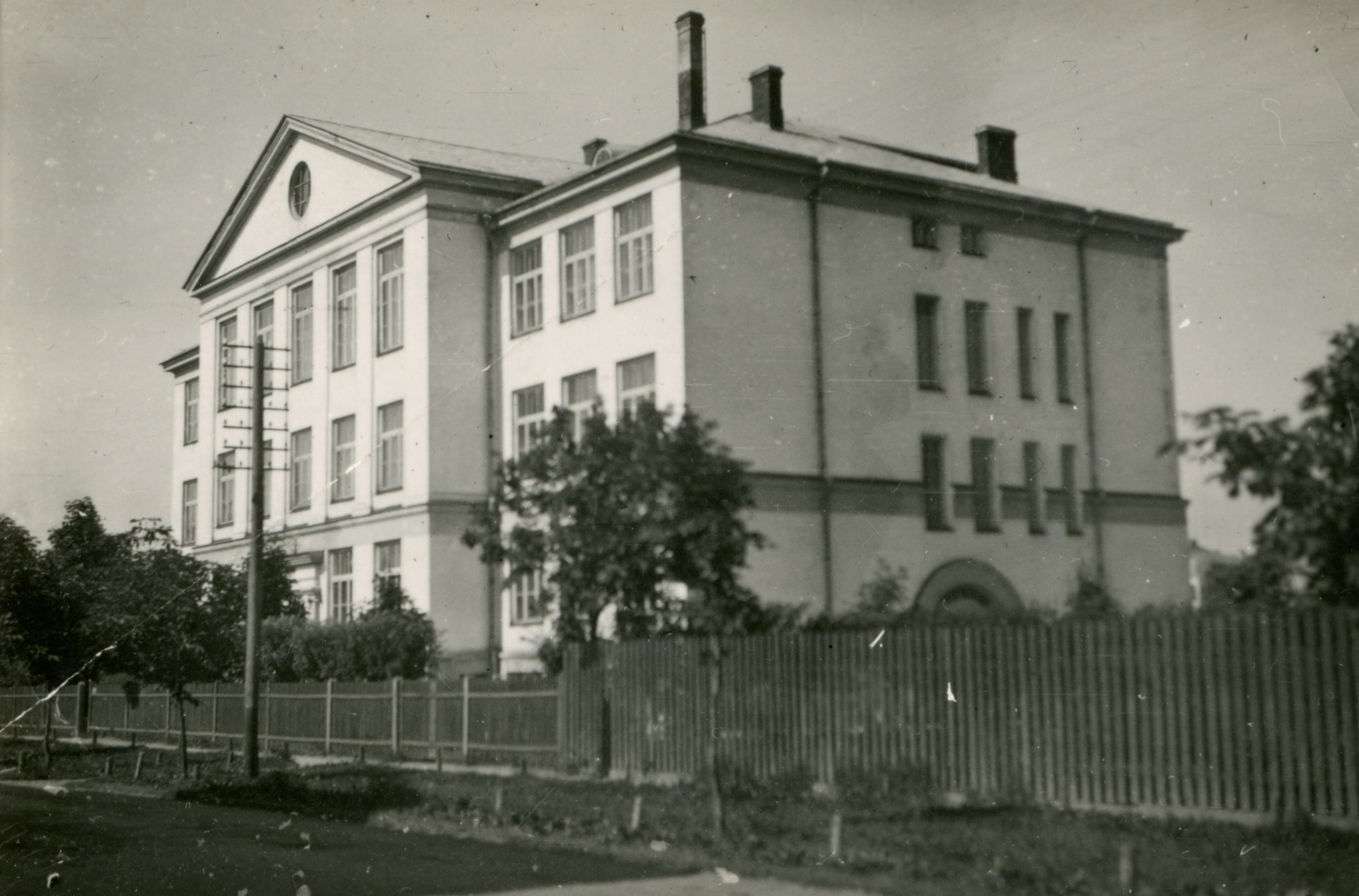 Vabriku tn 10 asuvale 9 Algkooli majale